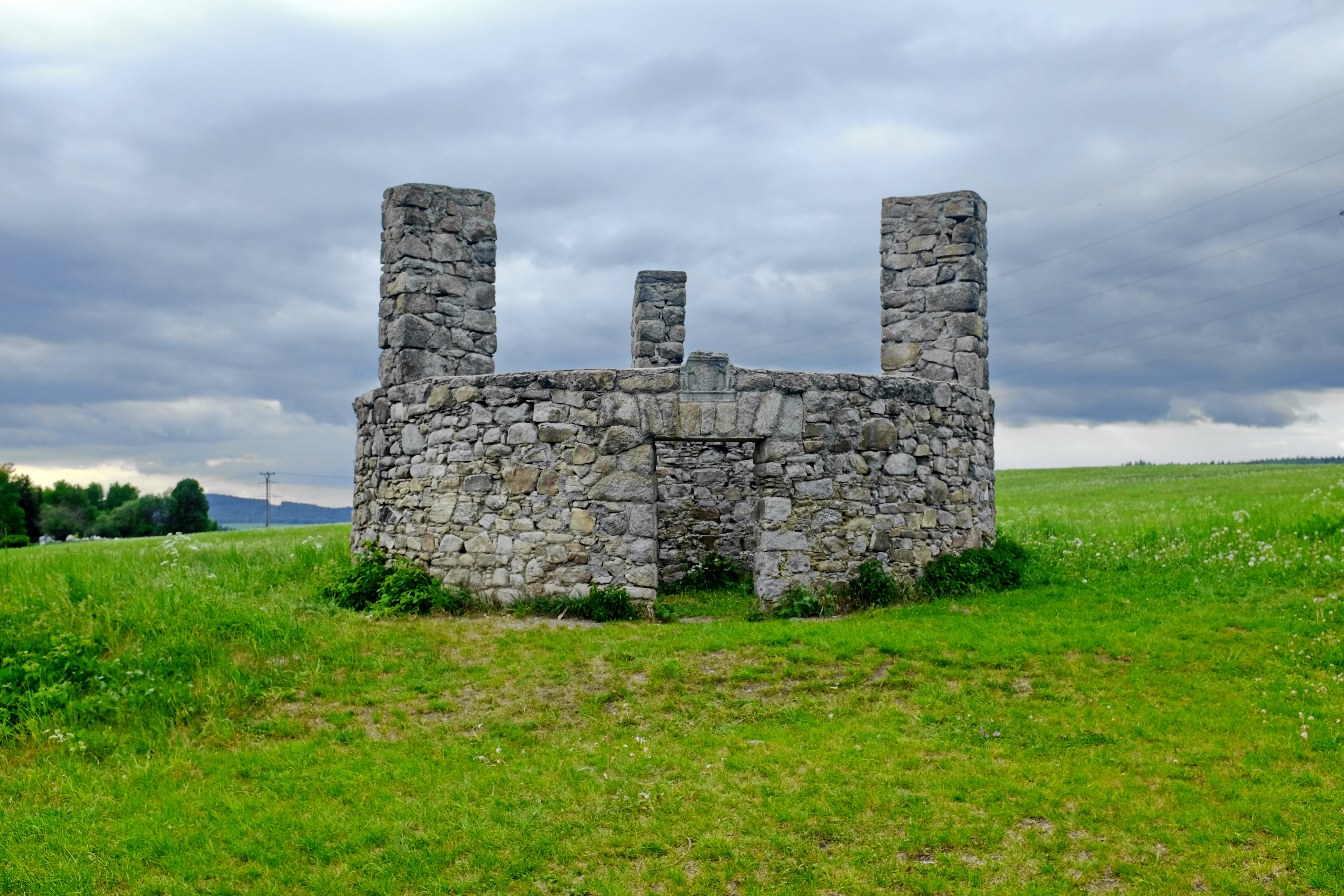 Památník na popraviště, Šibeniční vrch, Bošířany st. 69, Horní Slavkov.